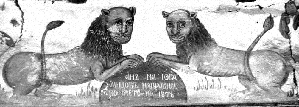 Стенопис в хана на Йован Мицов в Бели Мел, 1878